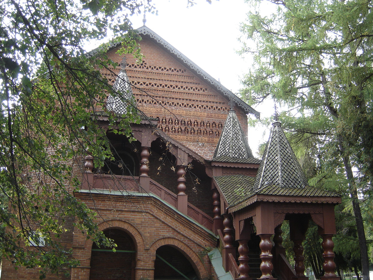 Maison du Prince Dimitri Ouglich, (крыльца = Kryltsa, porche)